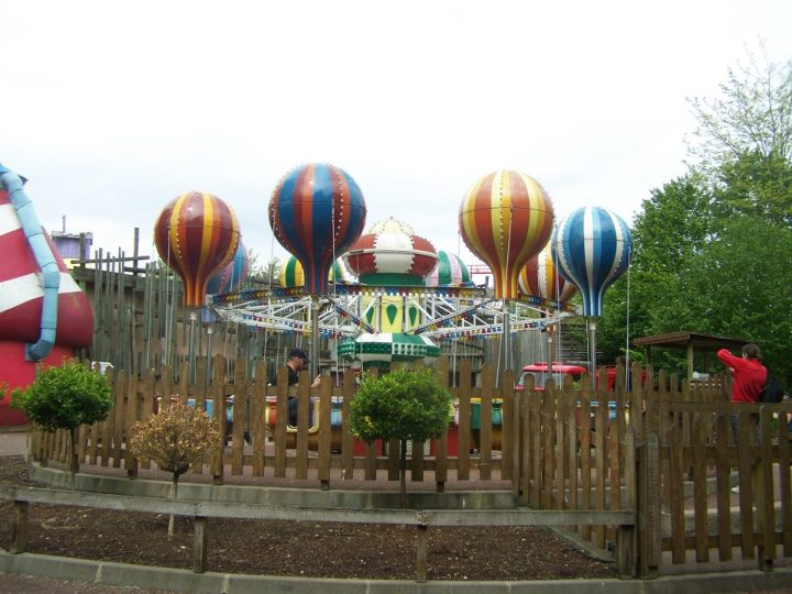 Mini montgolfières de Walygator Parc